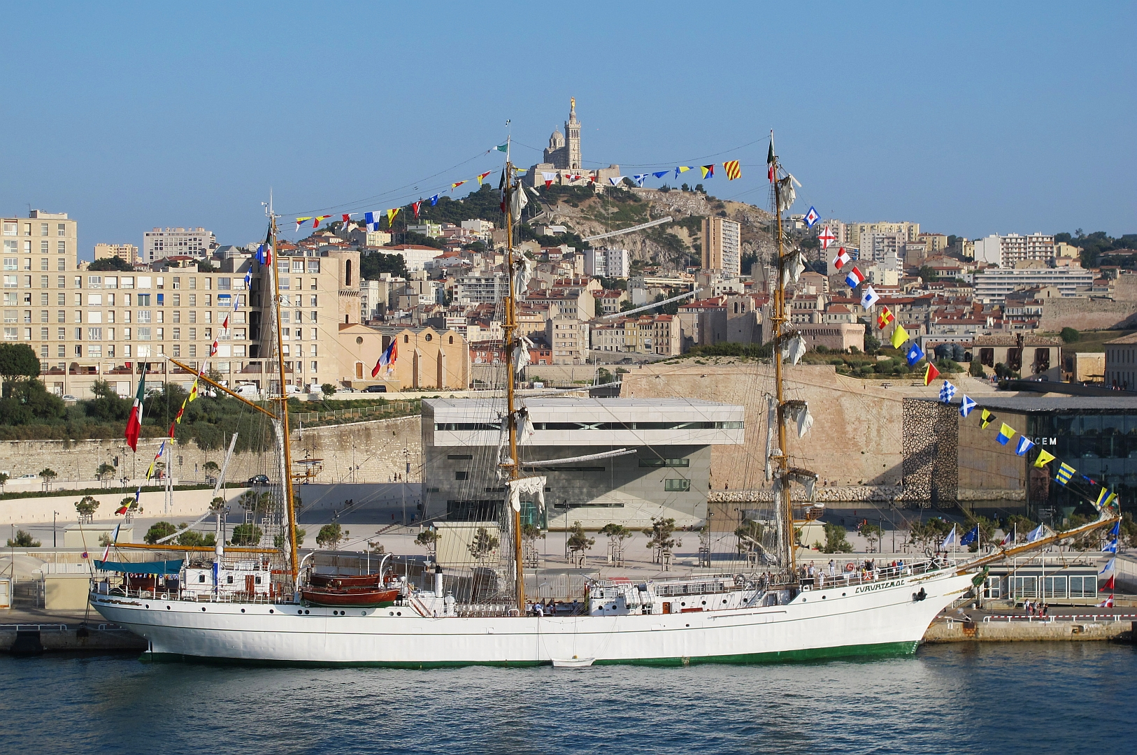 Le voilier mexicain Cuauhtémoc à Marseille le 18 juillet 2015. IMO Number: 8107505 MMSI Number: 345186001 Call sign: BE-01 Length of Hull: 78.50 m Beam: 12.00 m